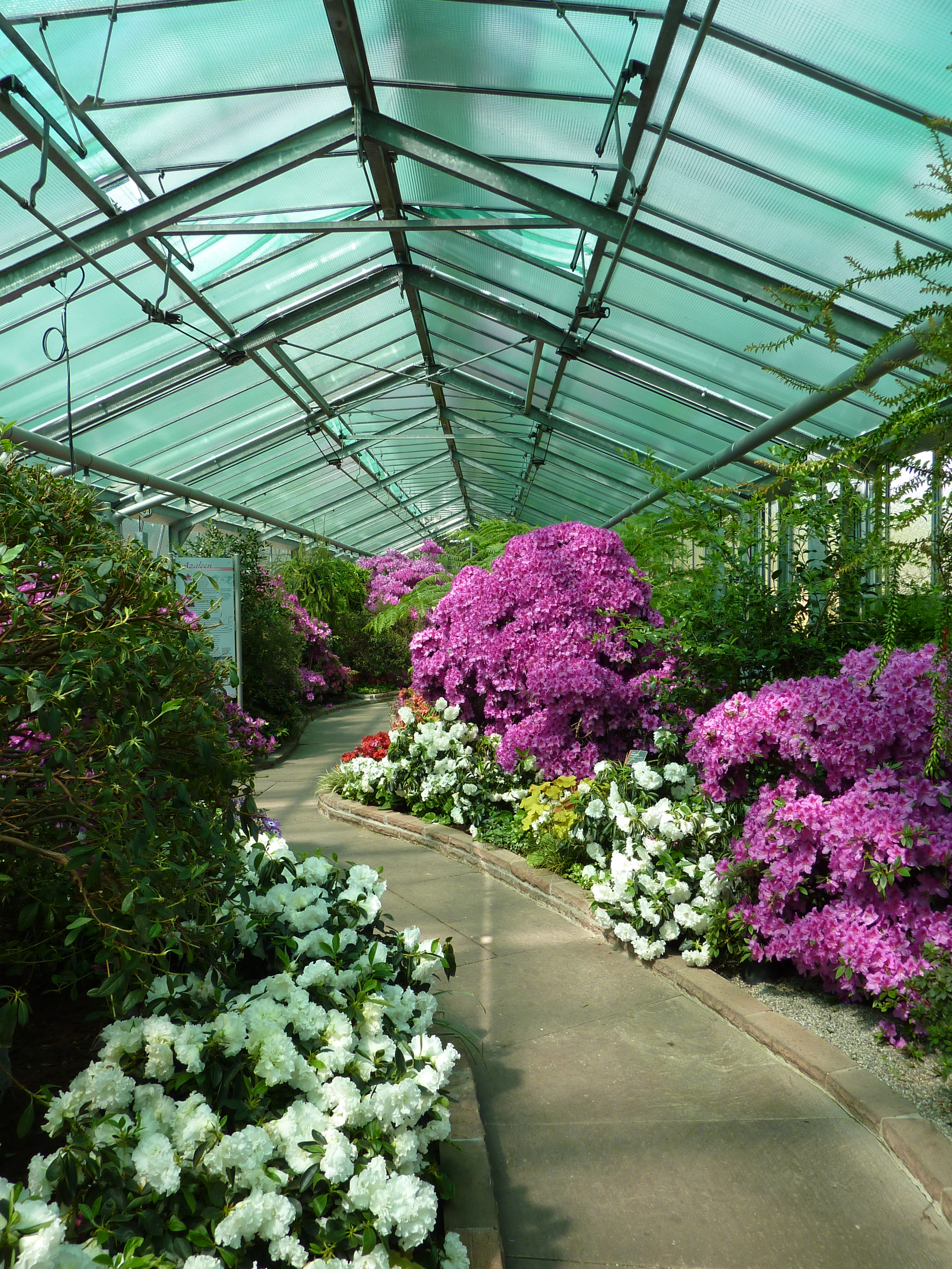 Gewächshaus in der Wilhelma